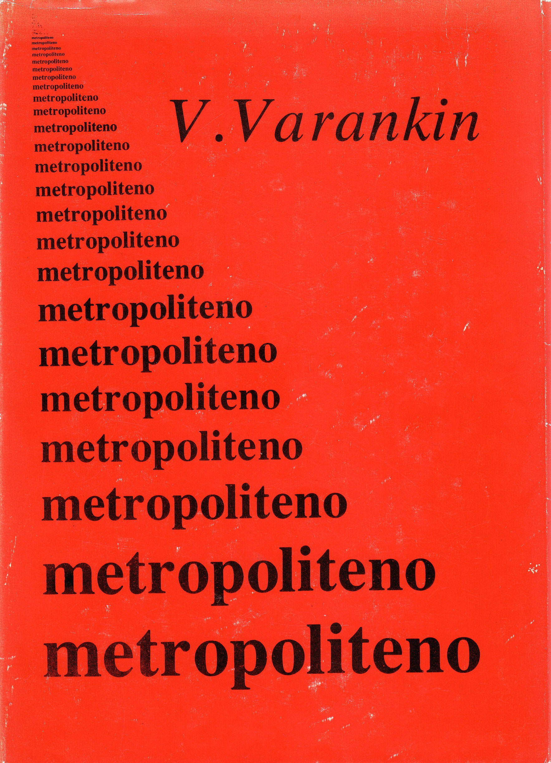 Metropoliteno